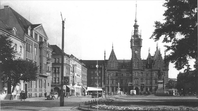 Nieistniejący ratusz na Placu Słowiańskim (Friedrich - Wilhelm - Platz)